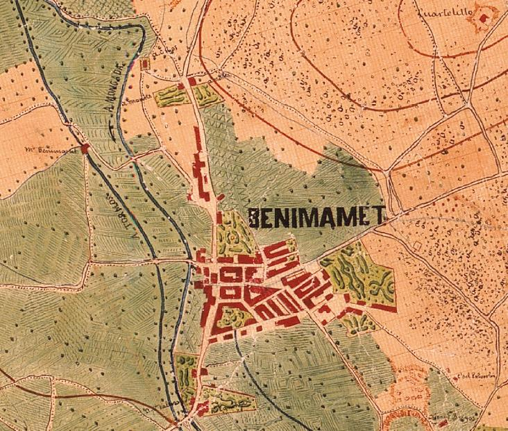 Benimàmet el 1883 (el nord està a la dreta).